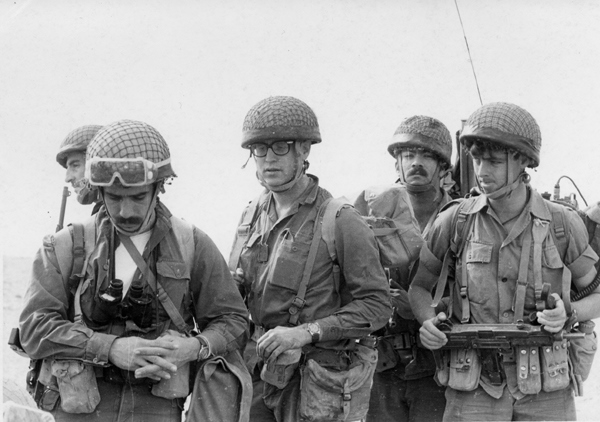 מבצע-רודוס - כיבוש האי שדואן. רביעי מימין: חיים נדל, אחריו: יעקב חסדאי. מקום הצילום: שדואן.